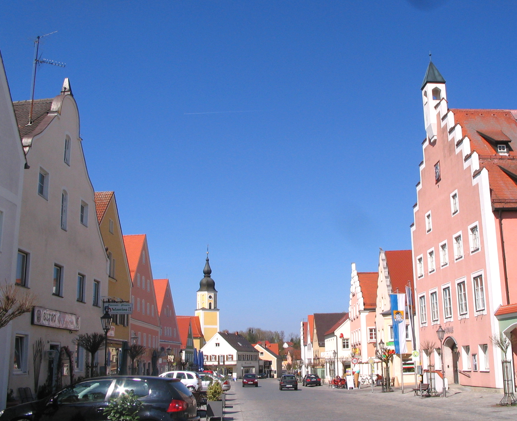 Langquaid, Landkreis Kelheim, Niederbayern: Marktplatz